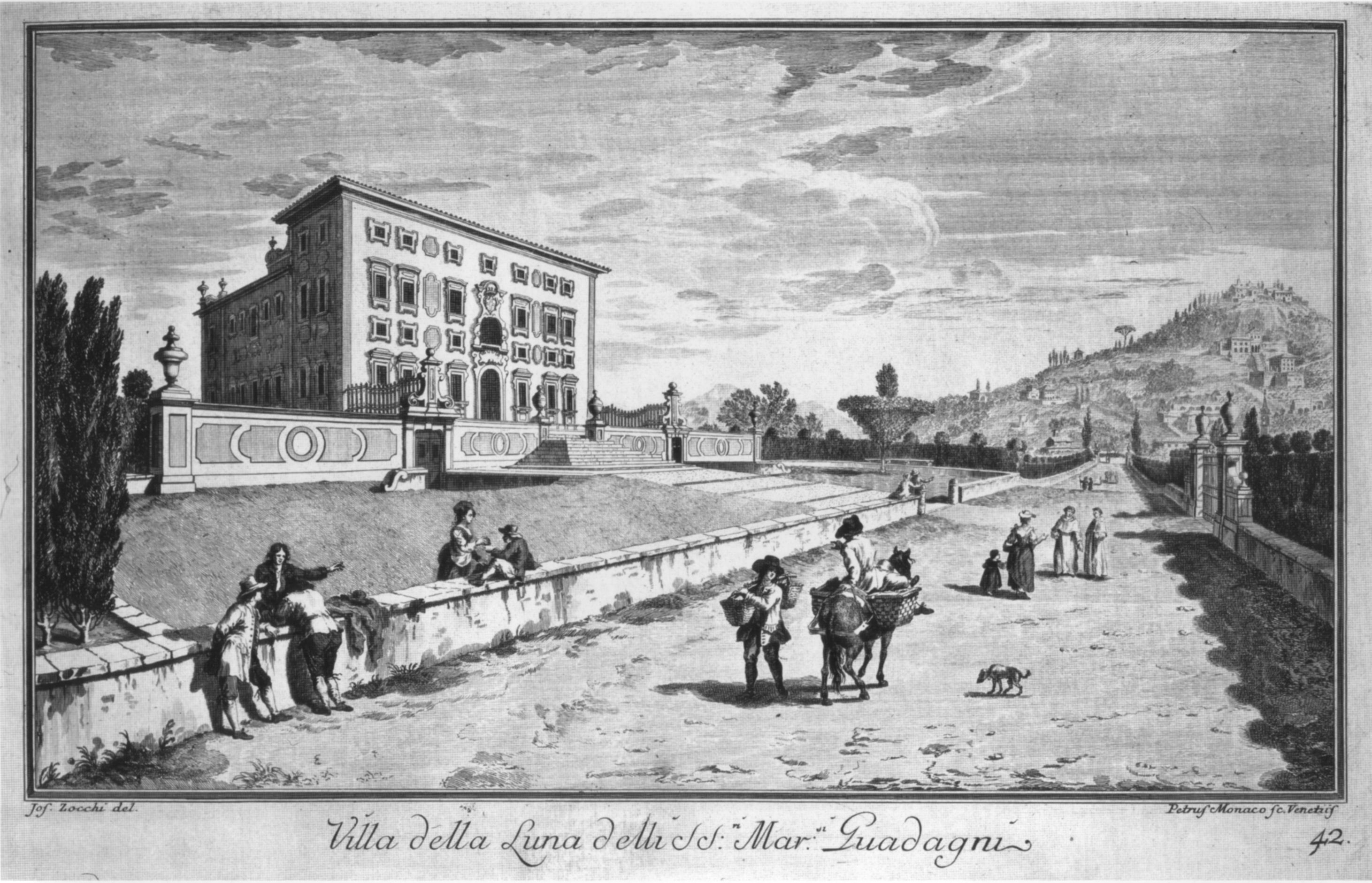 Zocchi, ville 44 luna